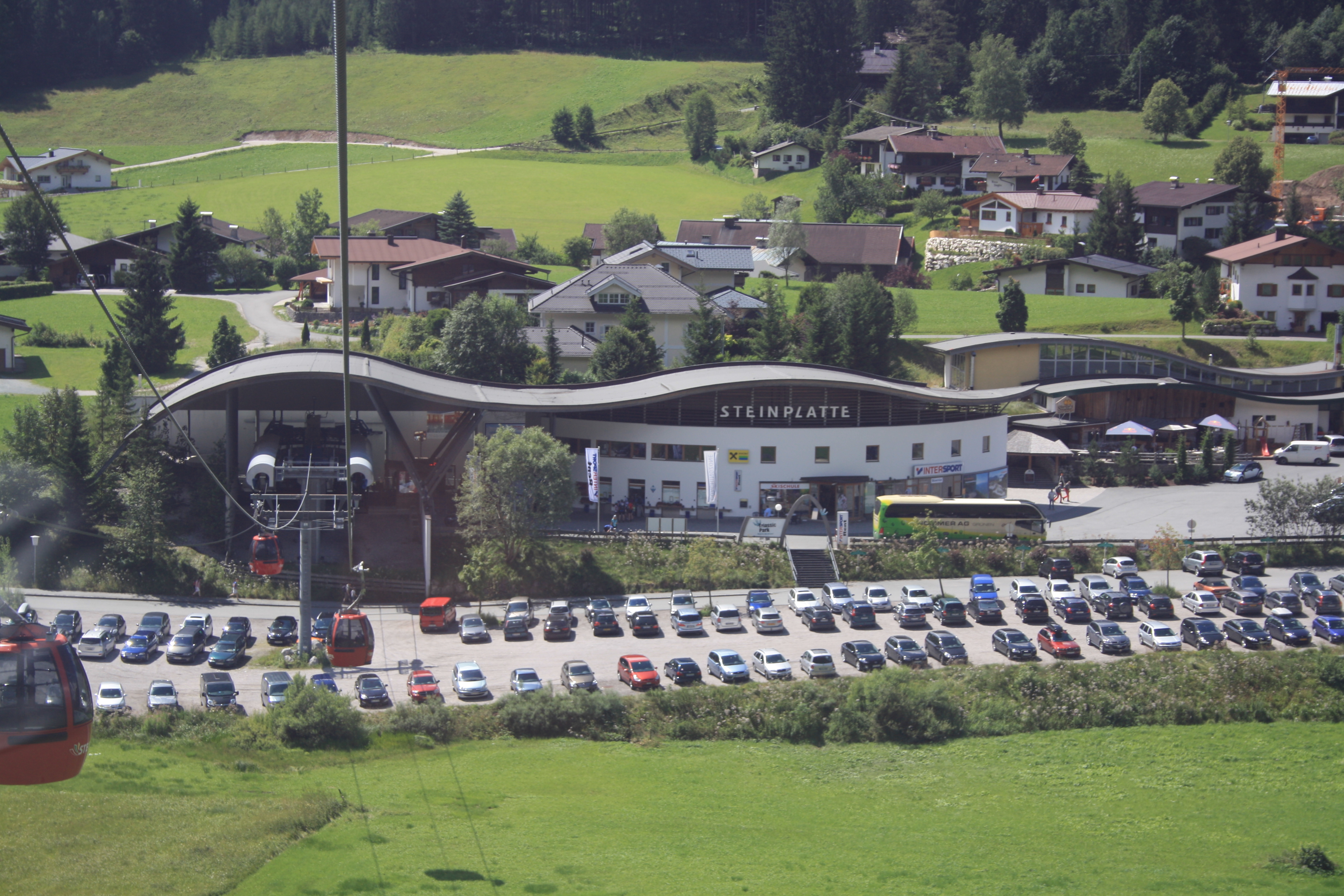 Blick auf die Talstation der Bergbahn Steinplatte